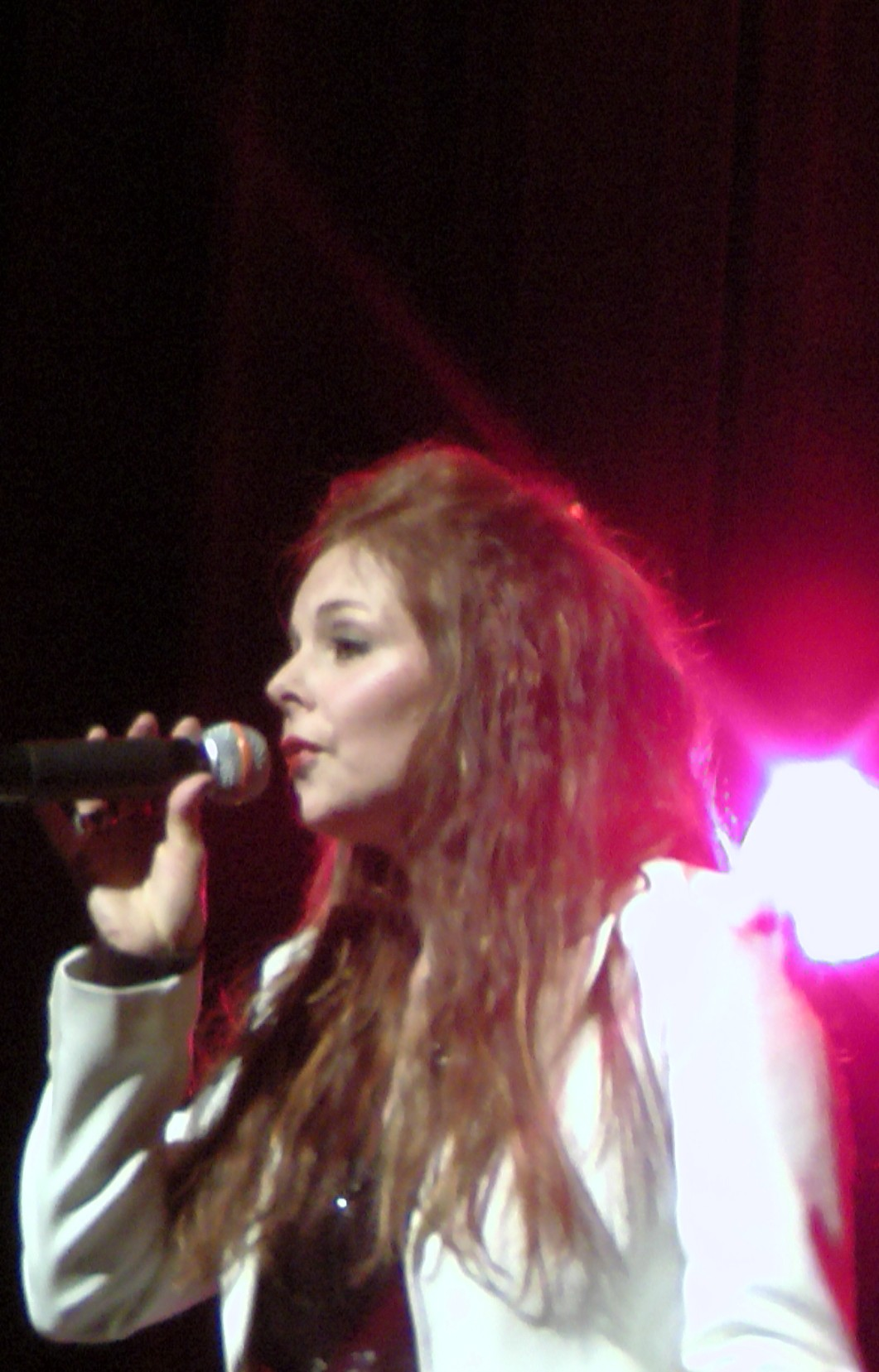 Doushka Esposito à Perpignan lors du Téléthon